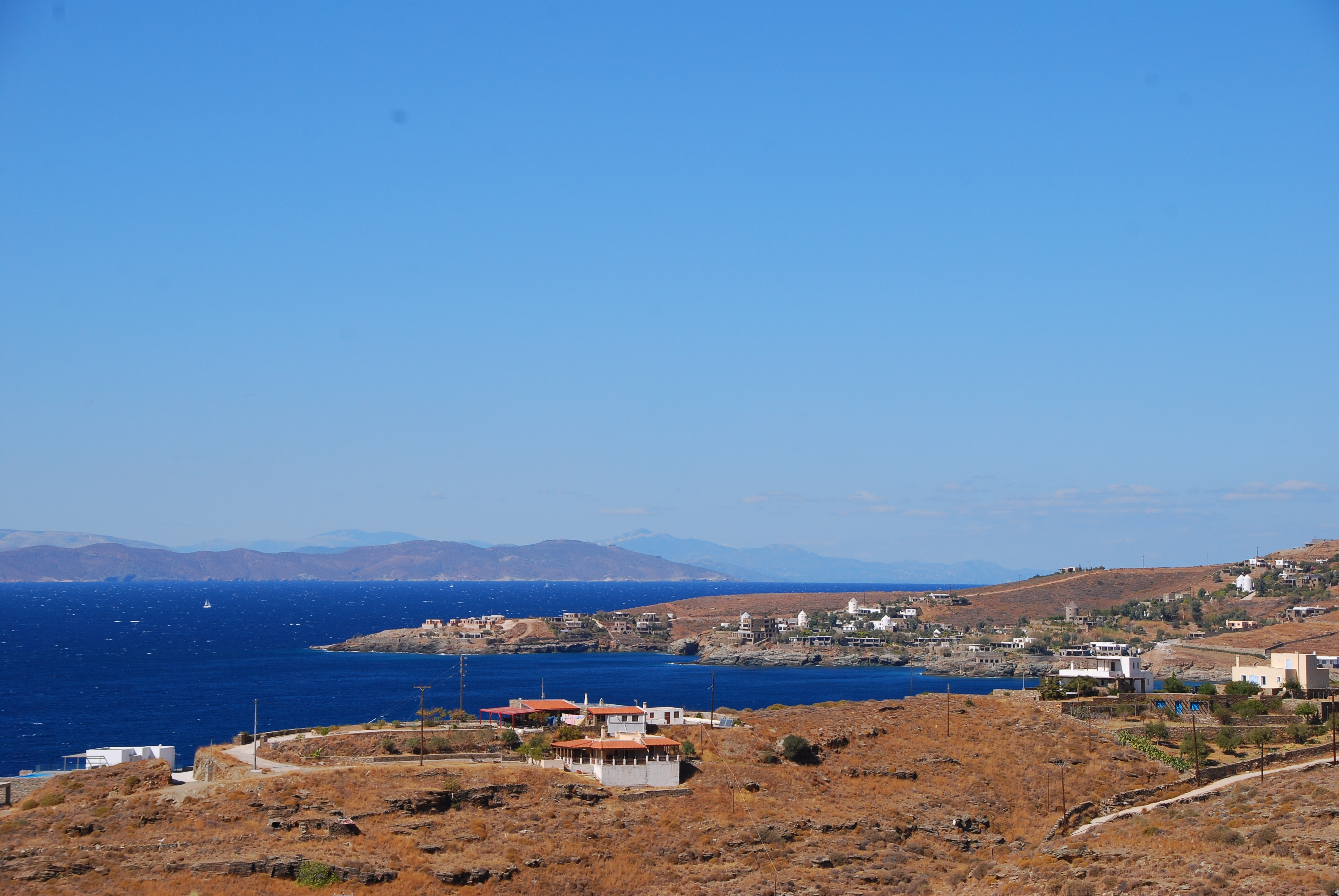 Κούνδουρος Κέας